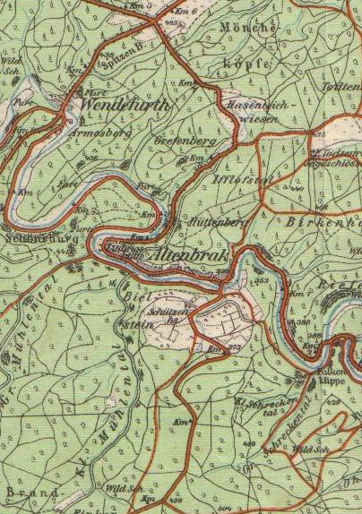 Karte von Altenbrak im Maßstab 1:50.000, 1912. Verlag: Albert Goldschmidt, Berlin, 1912